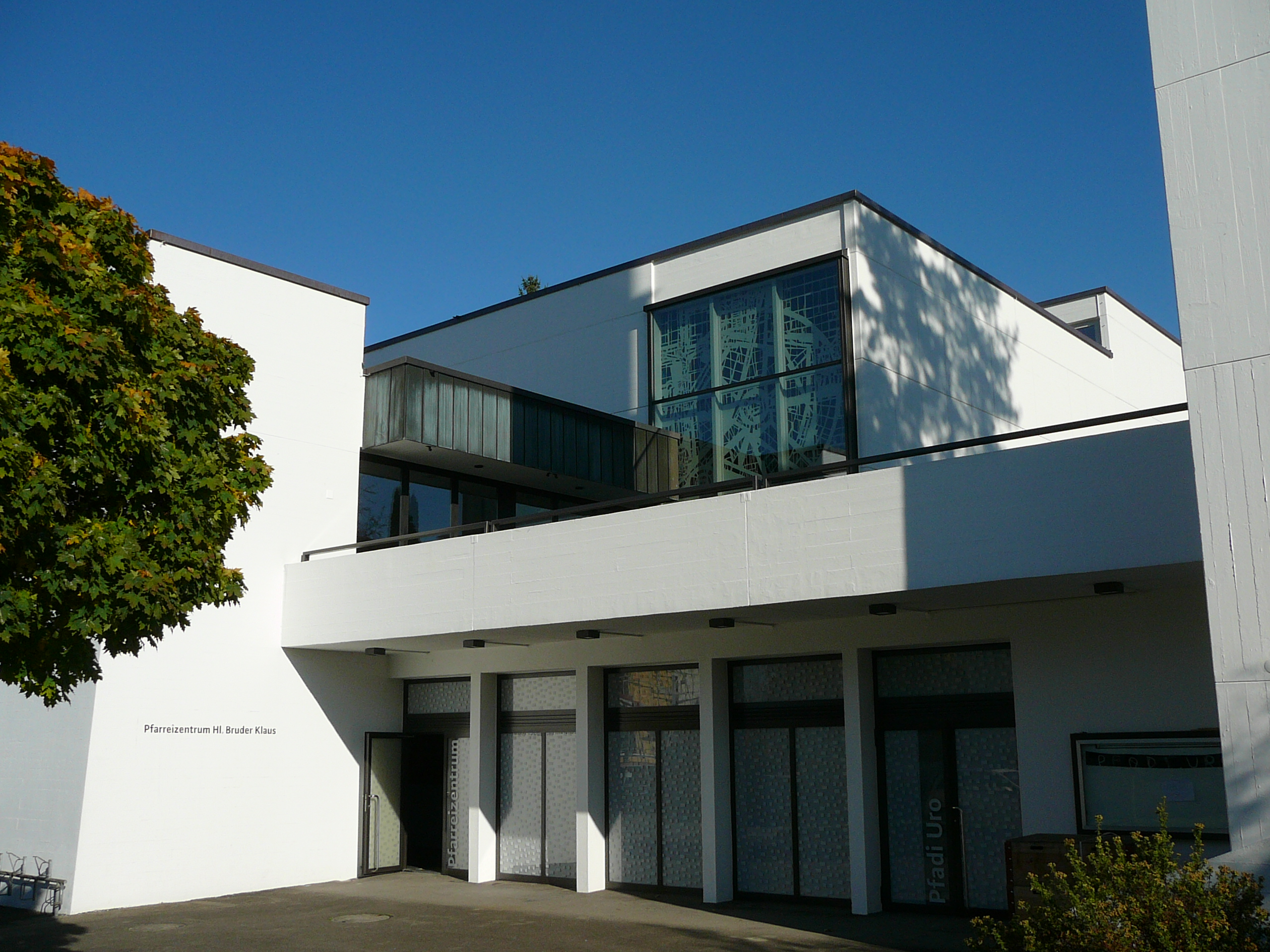 Römisch-katholische Pfarrkirche Bruder Klaus Urdorf Eingang